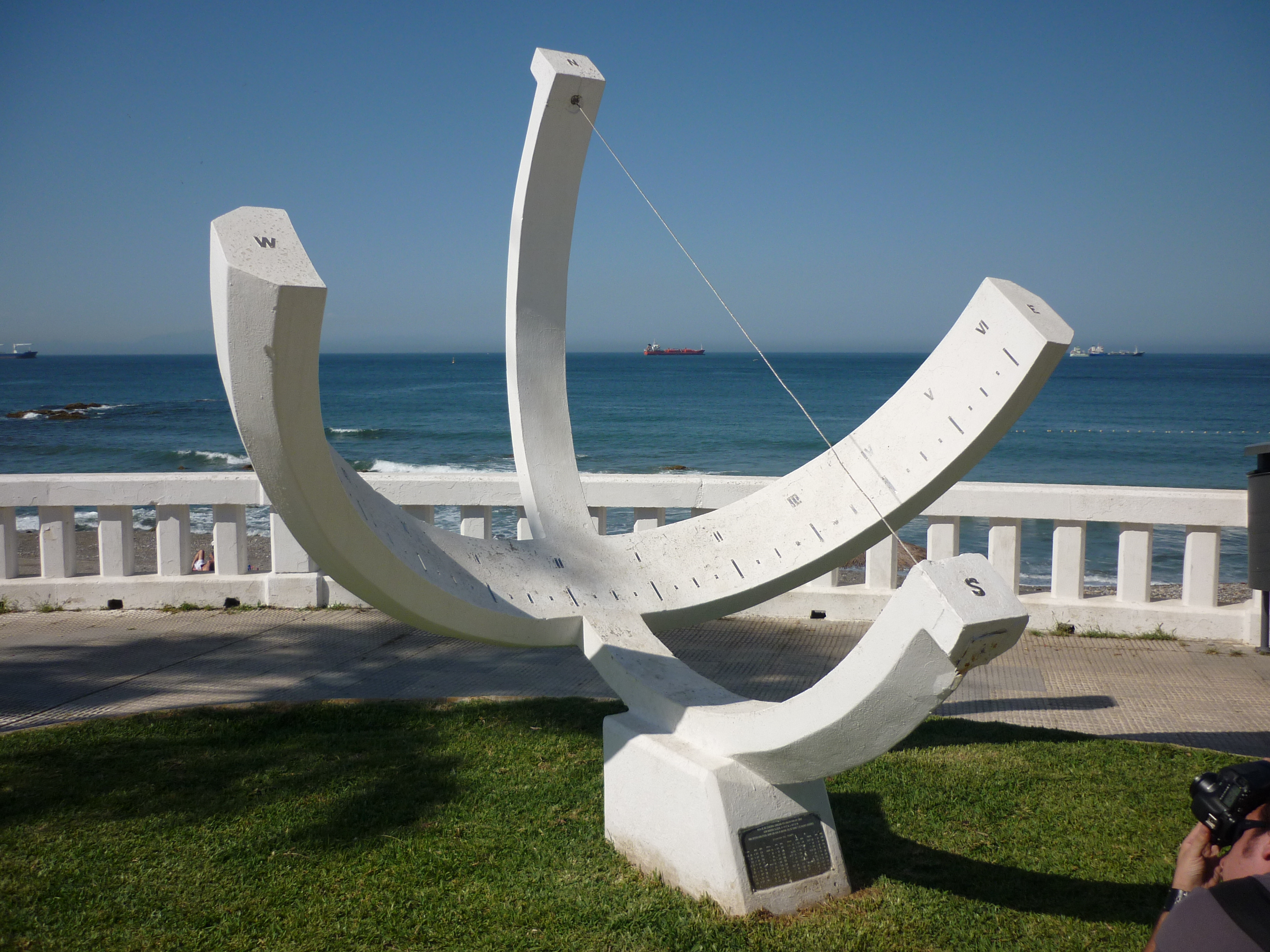 Fotografías de Cañete